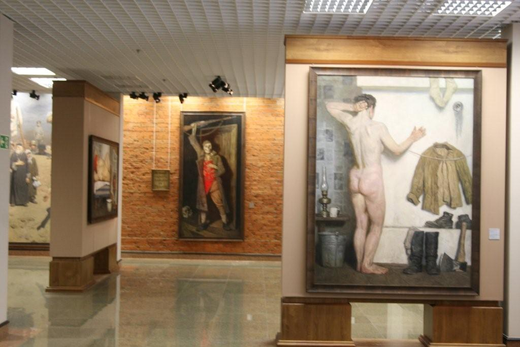 Институт русского реалистического искусства (ИРРИ)/ The Institute of Russian Realist Art (IRRA)